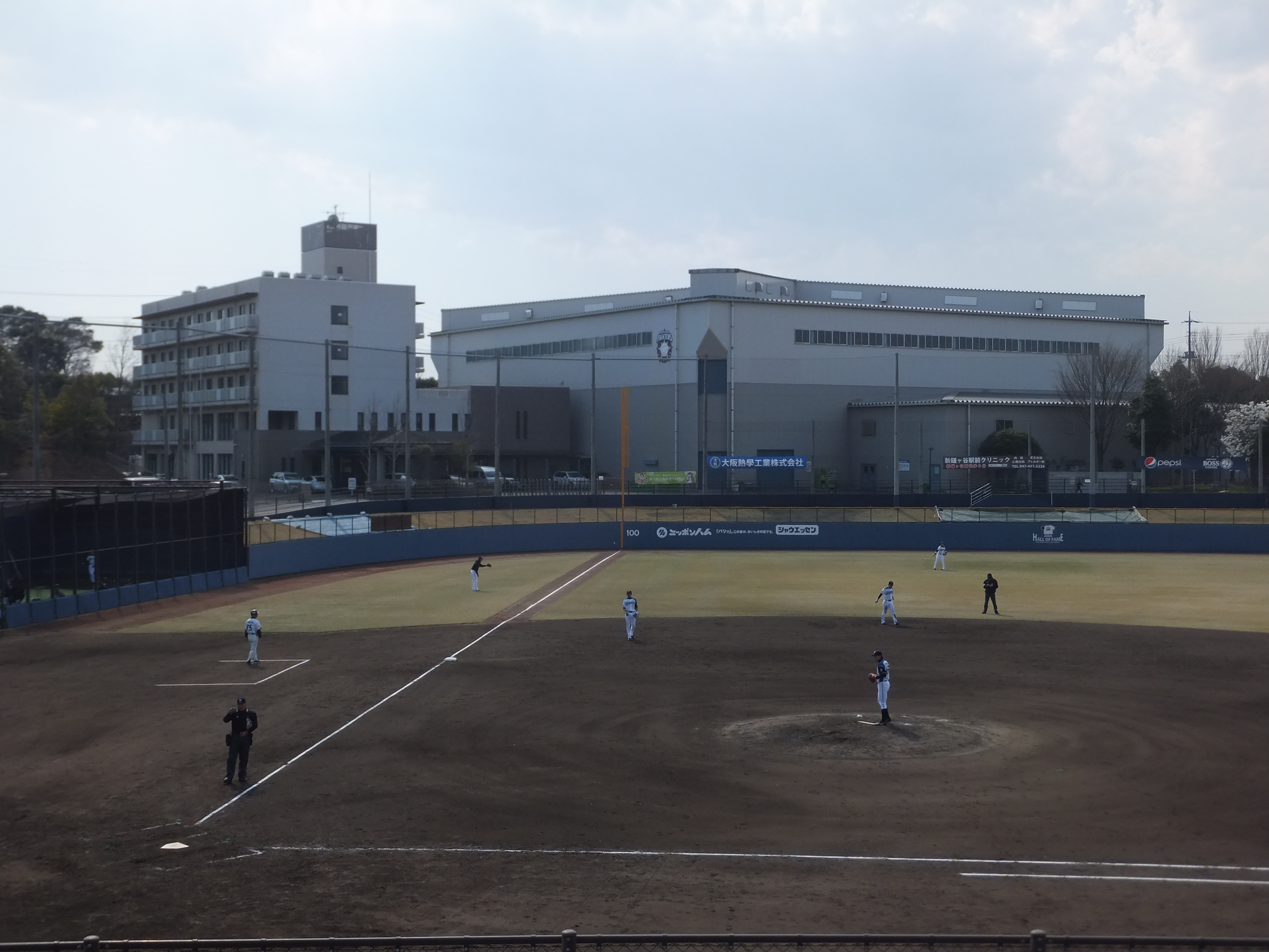 ファイターズスタジアム一塁側スタンドから。左翼後方にはファイターズの選手寮「勇翔寮」と屋内練習場がある。